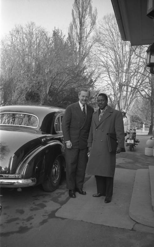 Essen für Min. Beavogui und Staatssekr. Diop von Guinea